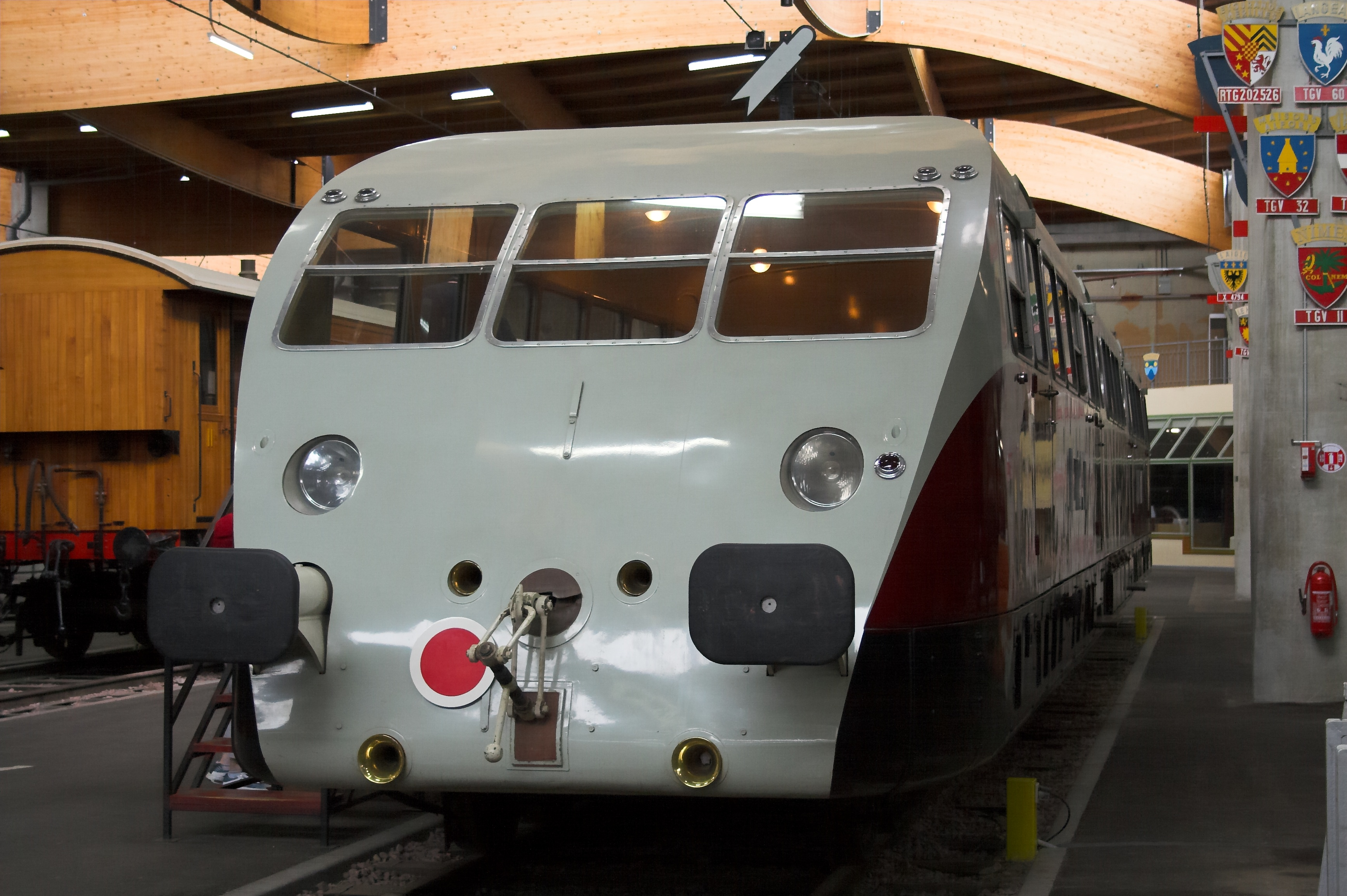 an autorail Bugatti at Cité du Train de Mulhouse(Mulhouse, France)